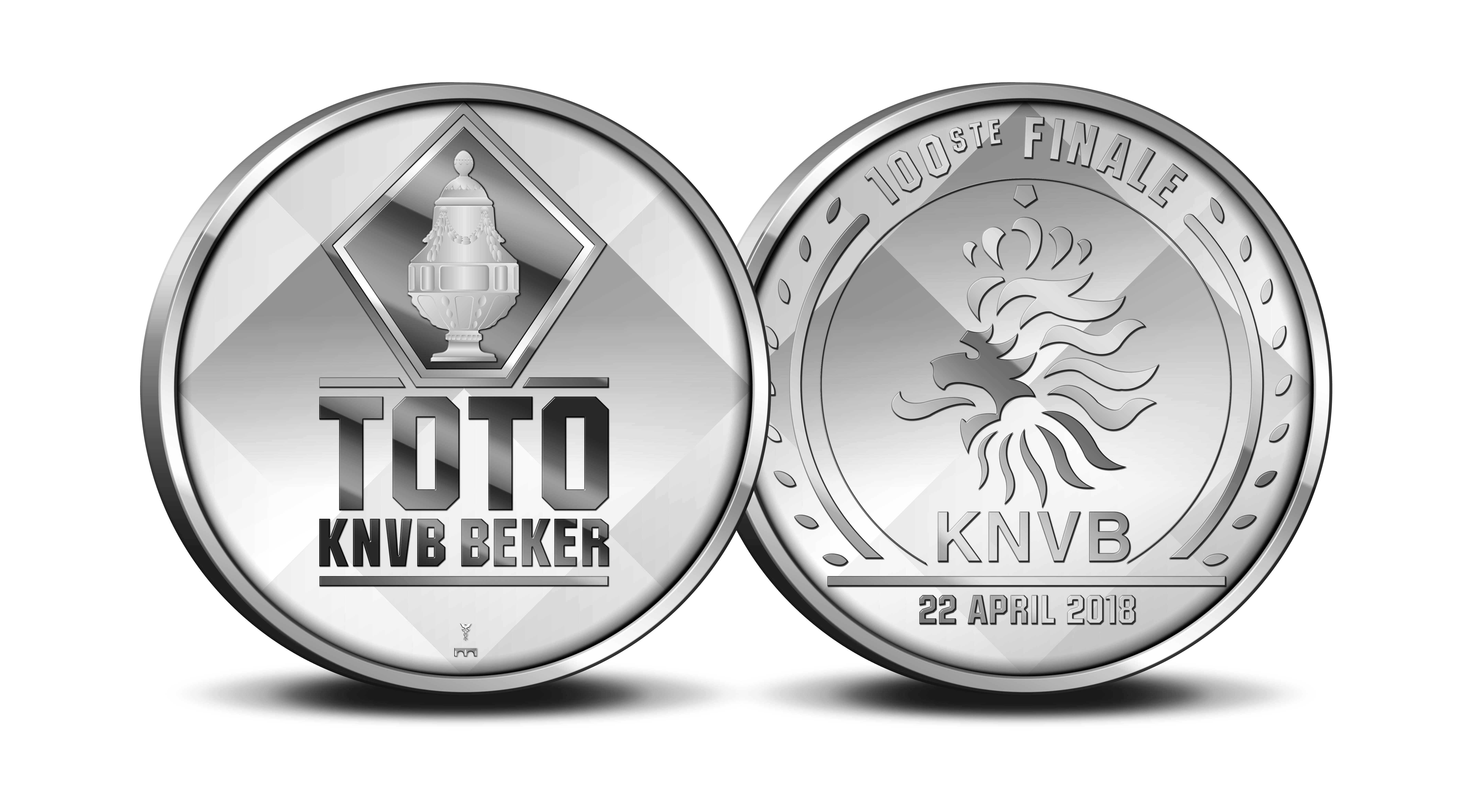 Ontwerp van herdenkingsmunt 'Gouden TOSS Munt', een officiële uitgifte ter ere van 100ste Bekerfinale in Nederland.